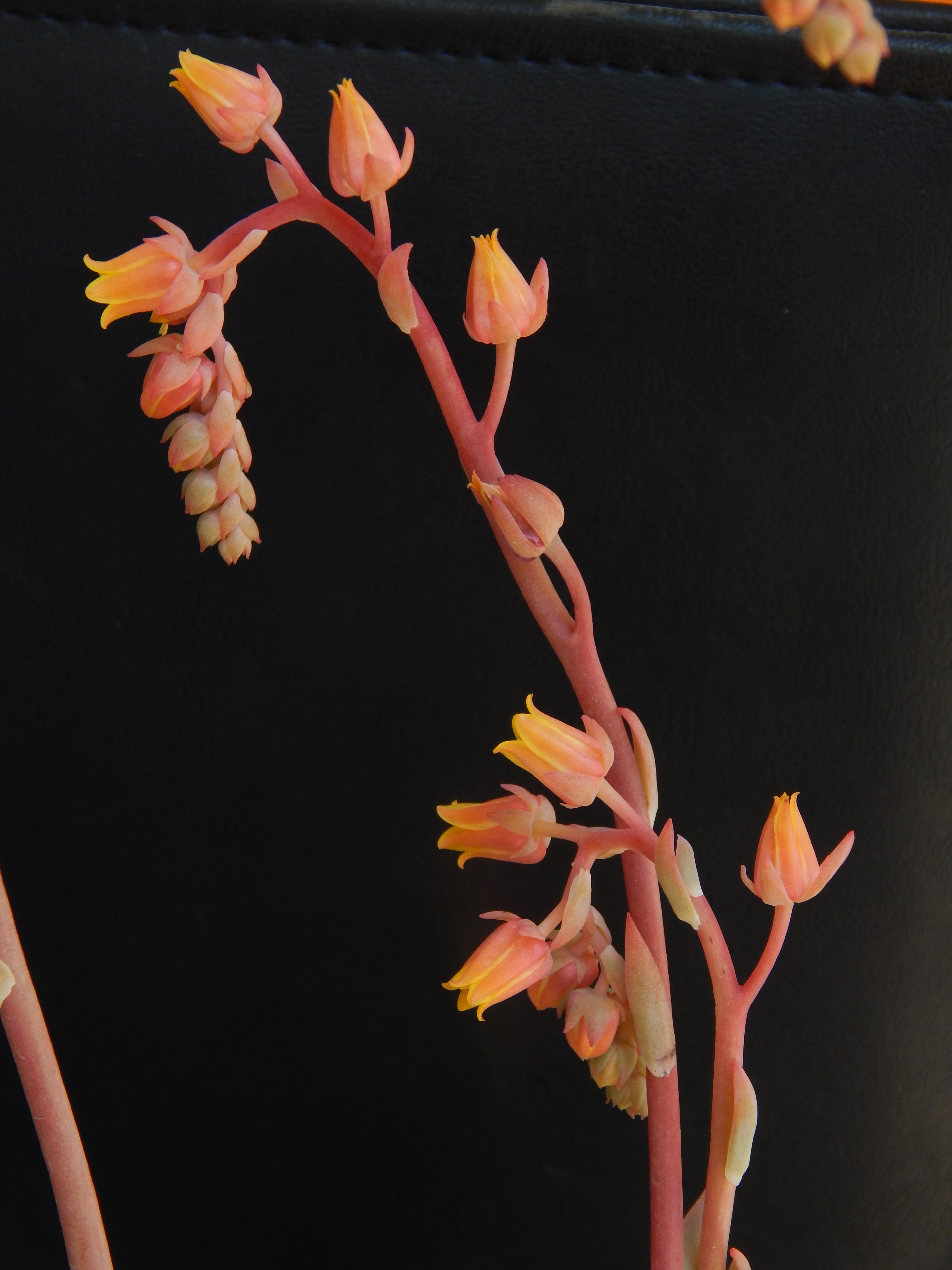 inflorescencia